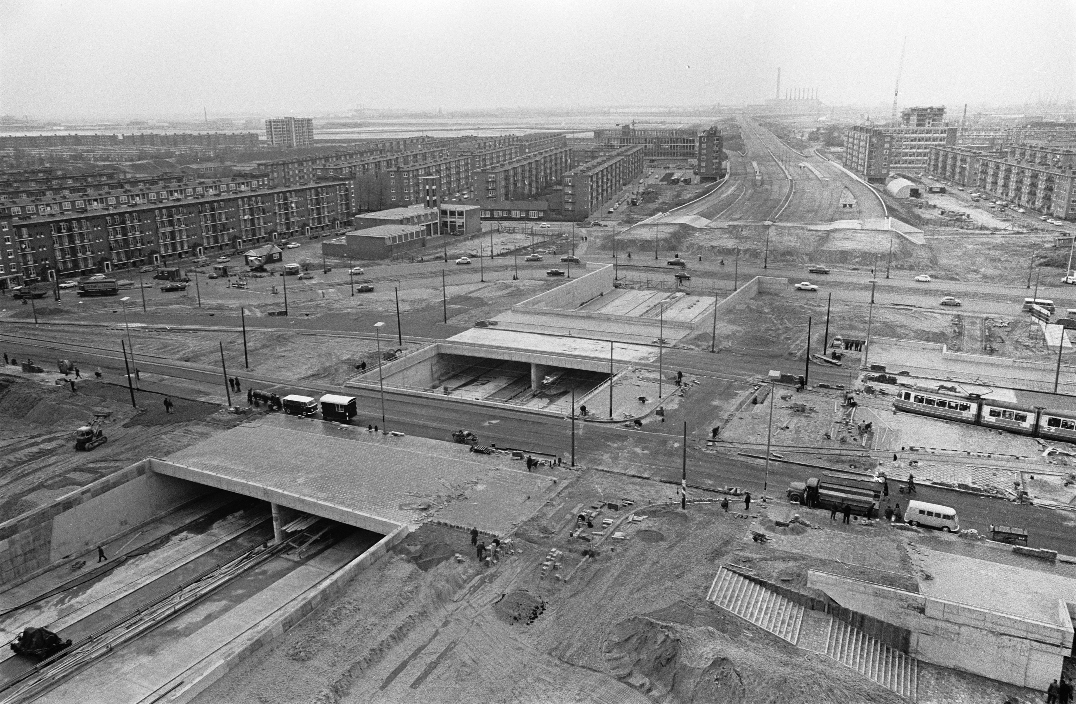 Collectie / Archief : Fotocollectie Anefo Reportage / Serie : [ onbekend ] Beschrijving : Overzicht van Coentunnel-aanvoerwegen vanaf GAK-gebouw Datum : 22 april 1966 Trefwoorden : overzichten Fotograaf : Nijs, Jac. de / Anefo Auteursrechthebbende : Nationaal Archief Materiaalsoort : Negatief (zwart/wit) Nummer archiefinventaris : bekijk toegang 2.24.01.05 Bestanddeelnummer : 919-0590 Reacties Geplaatst door Maaike op 22 januari 2013 - 20:01. Locatie: Einsteinweg; Bos en Lommer Plaats: Amsterdam